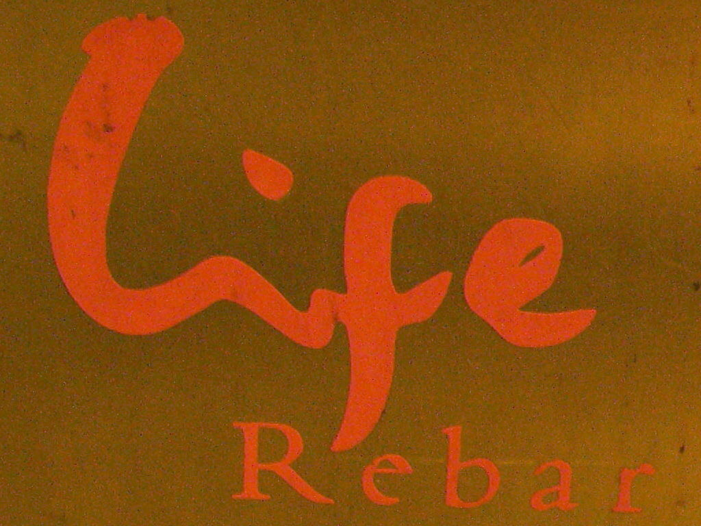 新生報業廣場1樓電梯門前，不鏽鋼垃圾桶正面殘留的力霸百貨商標。